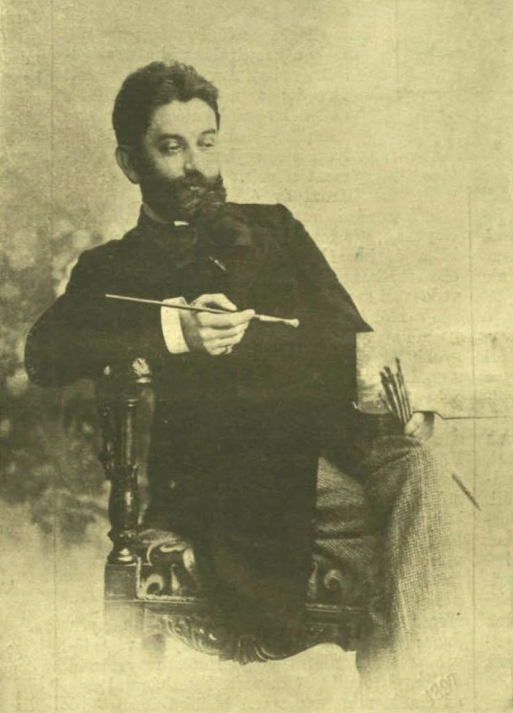 Mesterházy Kálmán (1857 – 1898) magyar tájfestő.